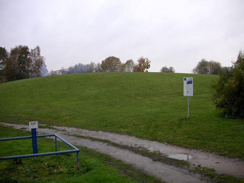 Burgwall Möllenhagen mit Informationsschild